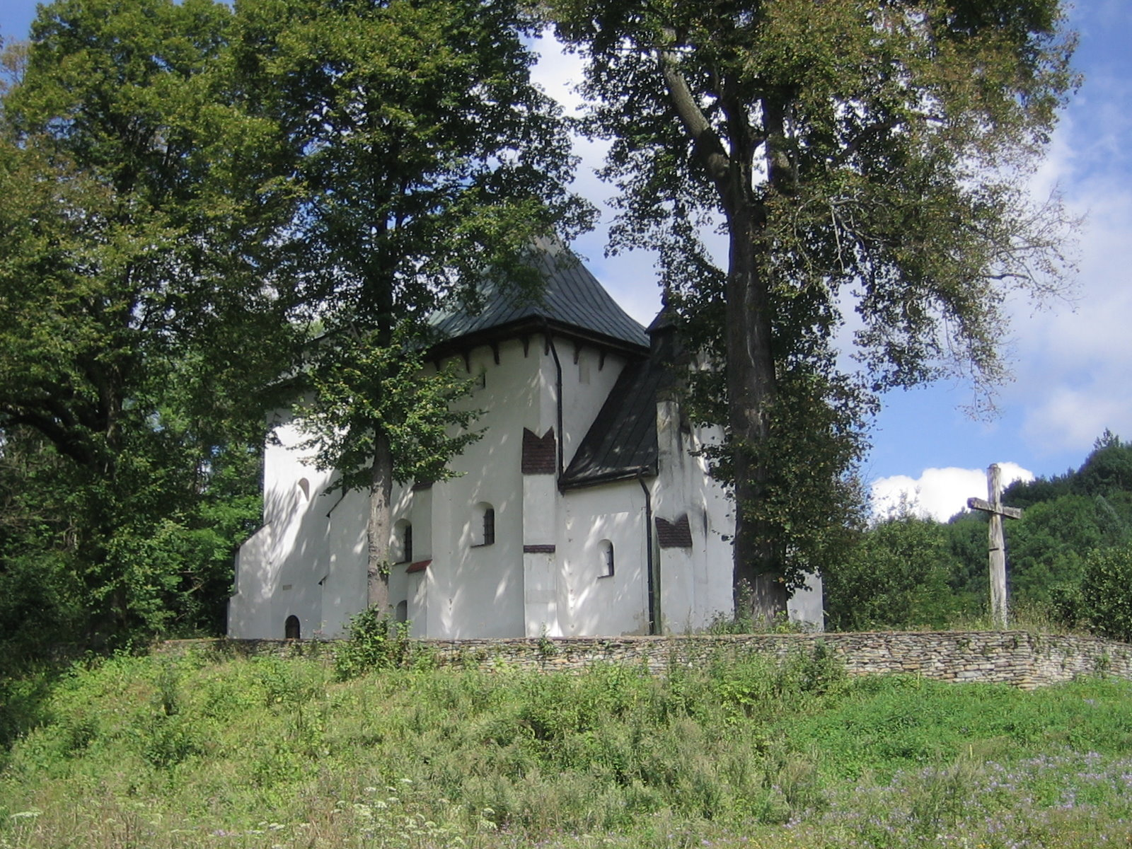 Posada Rybotycka (Poland), Orthodox church